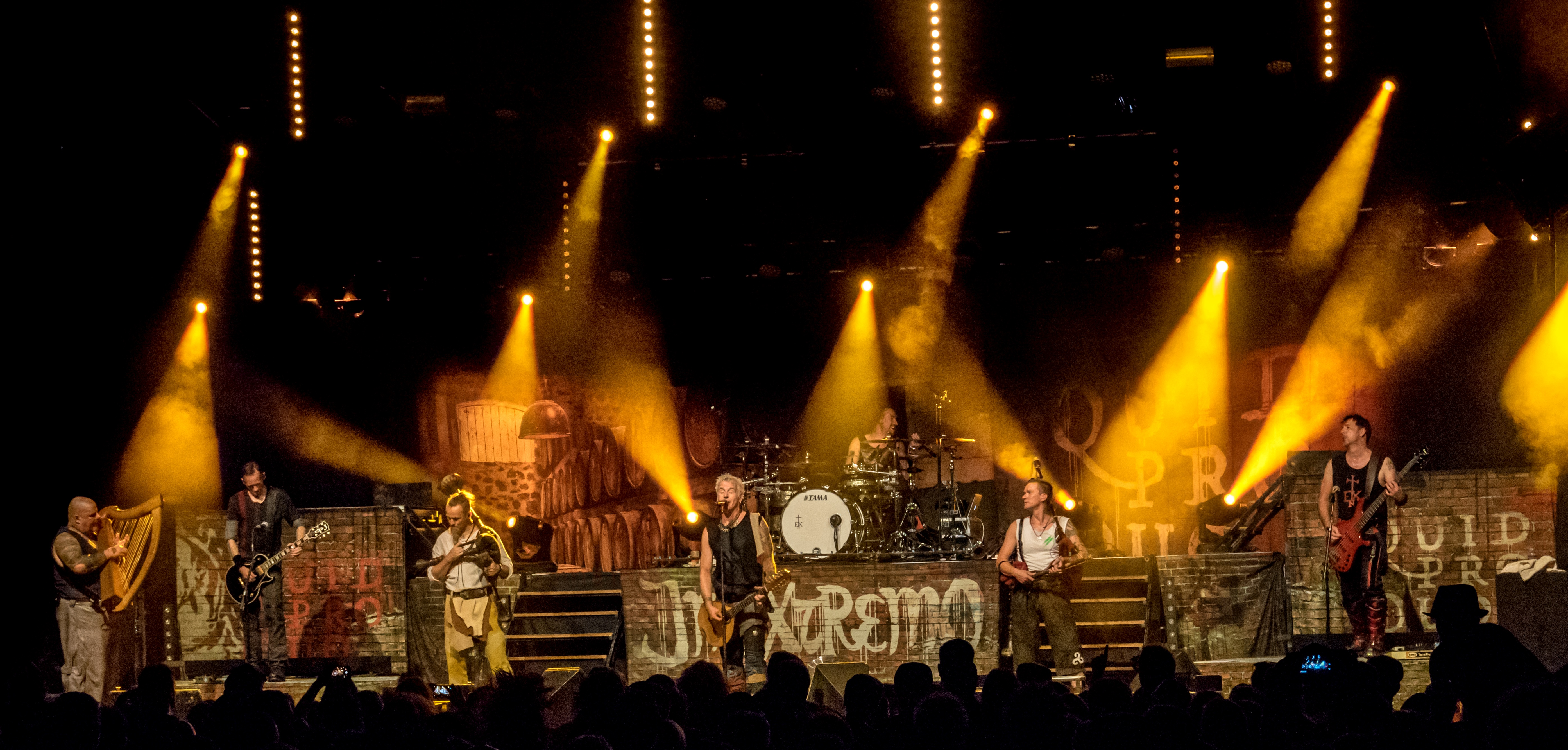 Bilder vom Zelt Musik Festival 2018 in Freiburg im Breisgau In Extremo am 29.07.2018 im Zirkuszelt